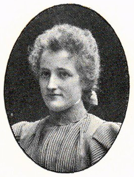 Balettdansösen Jenny Brandt, 1867–1933.